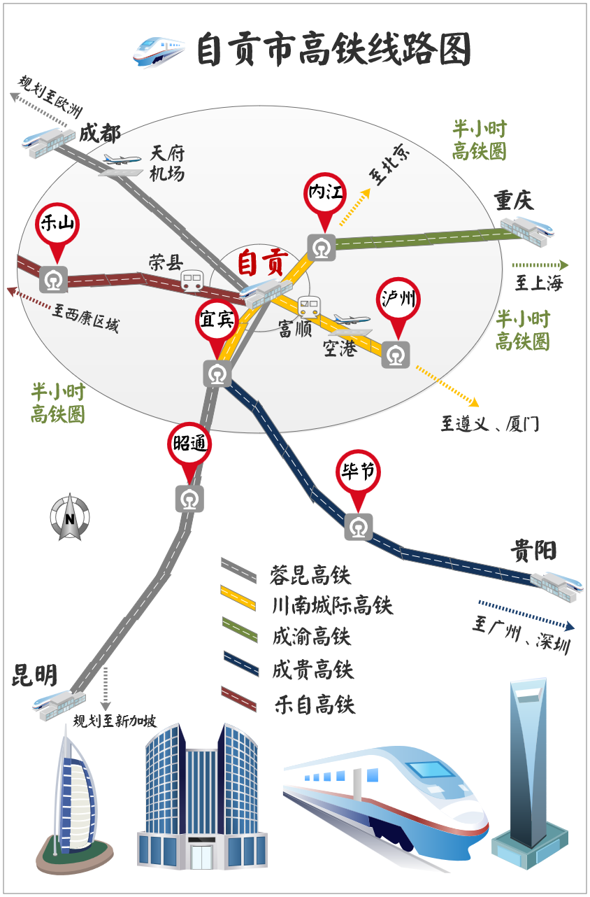 自贡高铁